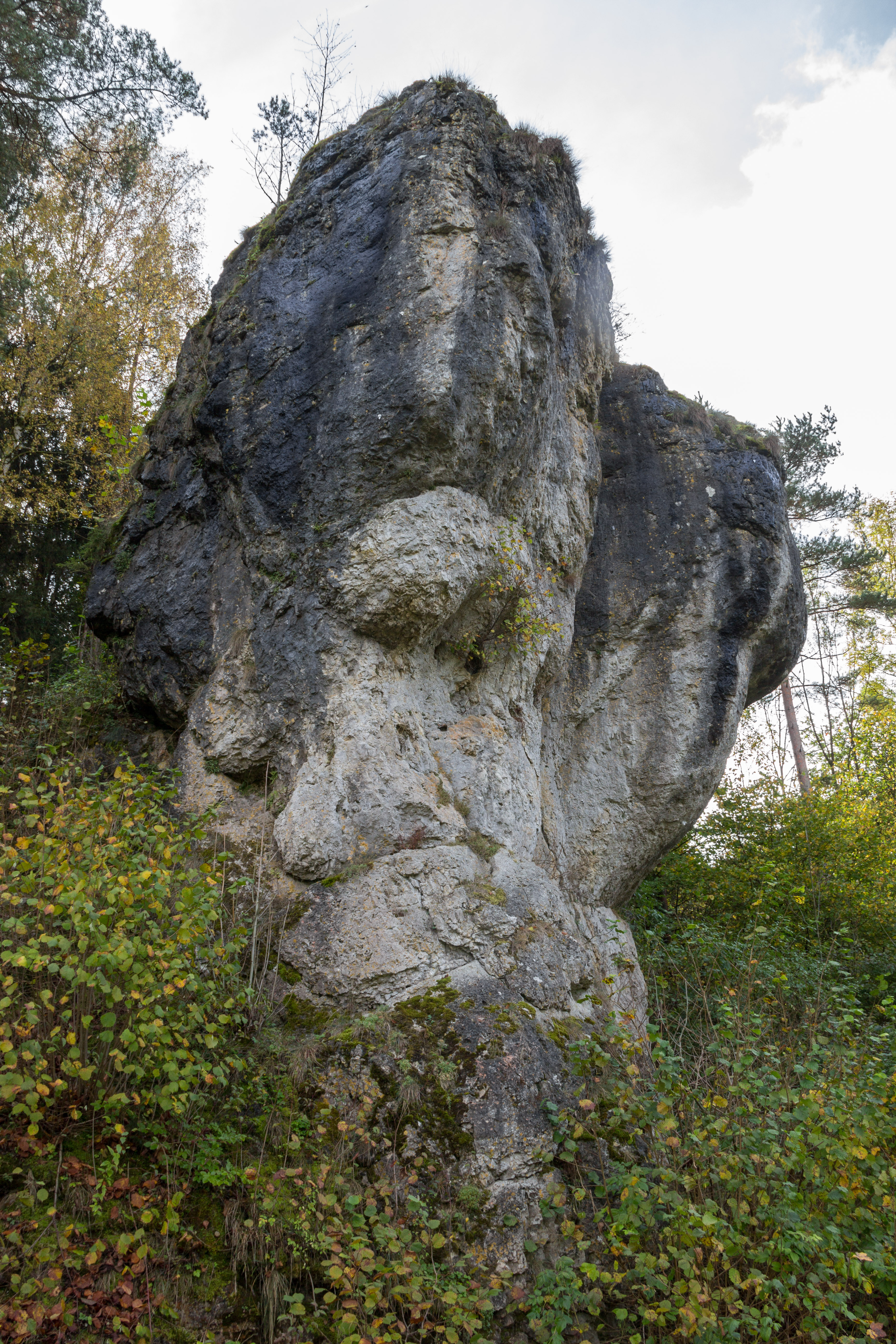 Heidenstein, Todsfelder Tal, Egloffstein, Thuisbrunn, Geotop